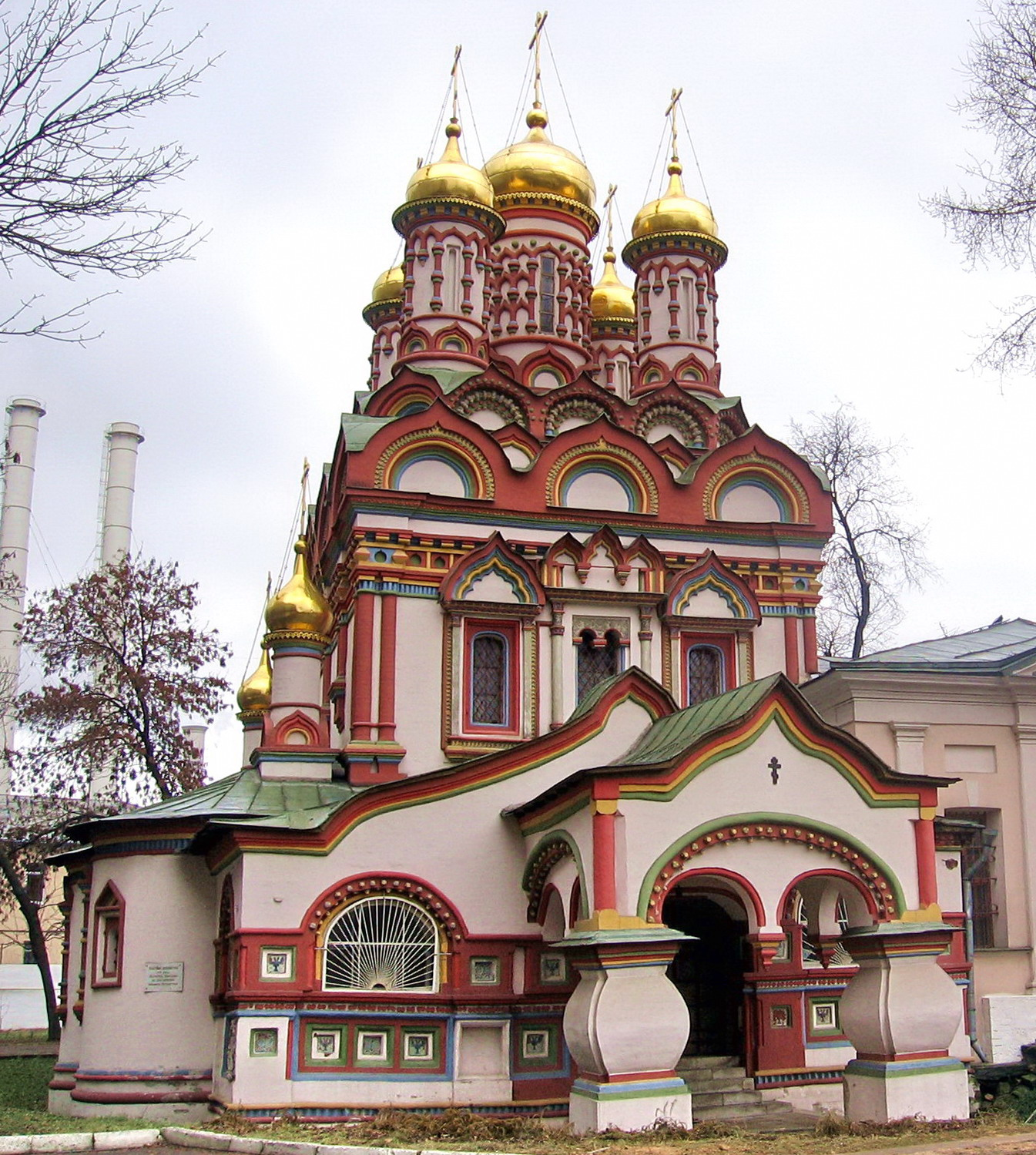 Cerkov' Nikolaya Chudotvorca